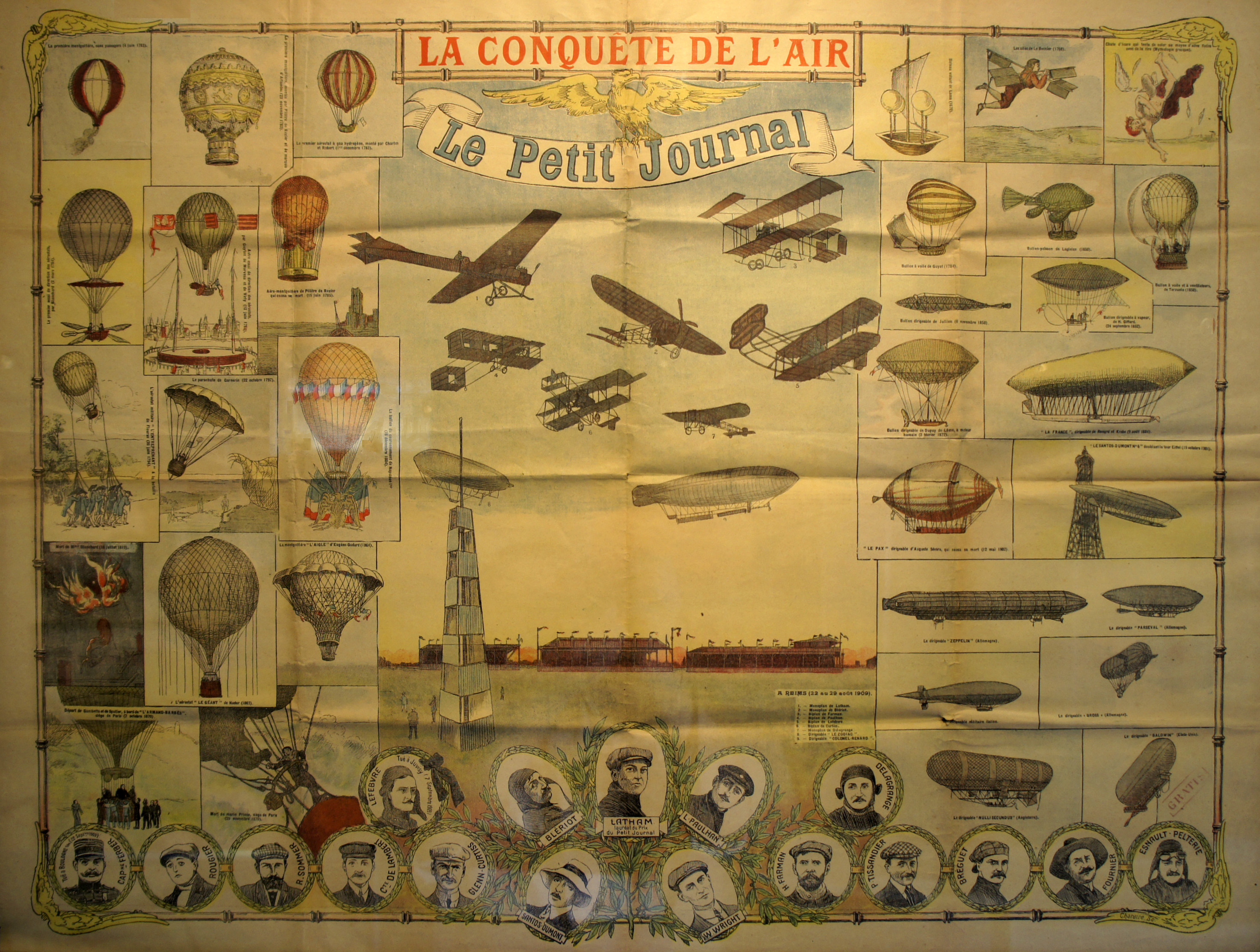 Dépliant gratuit du Petit Journal pour la Grande Semaine de l'aviation de CHampagne .